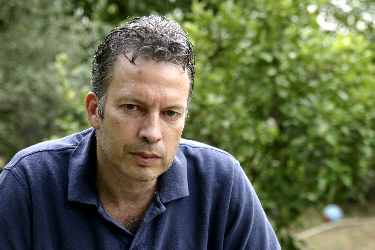 אילן יגודה